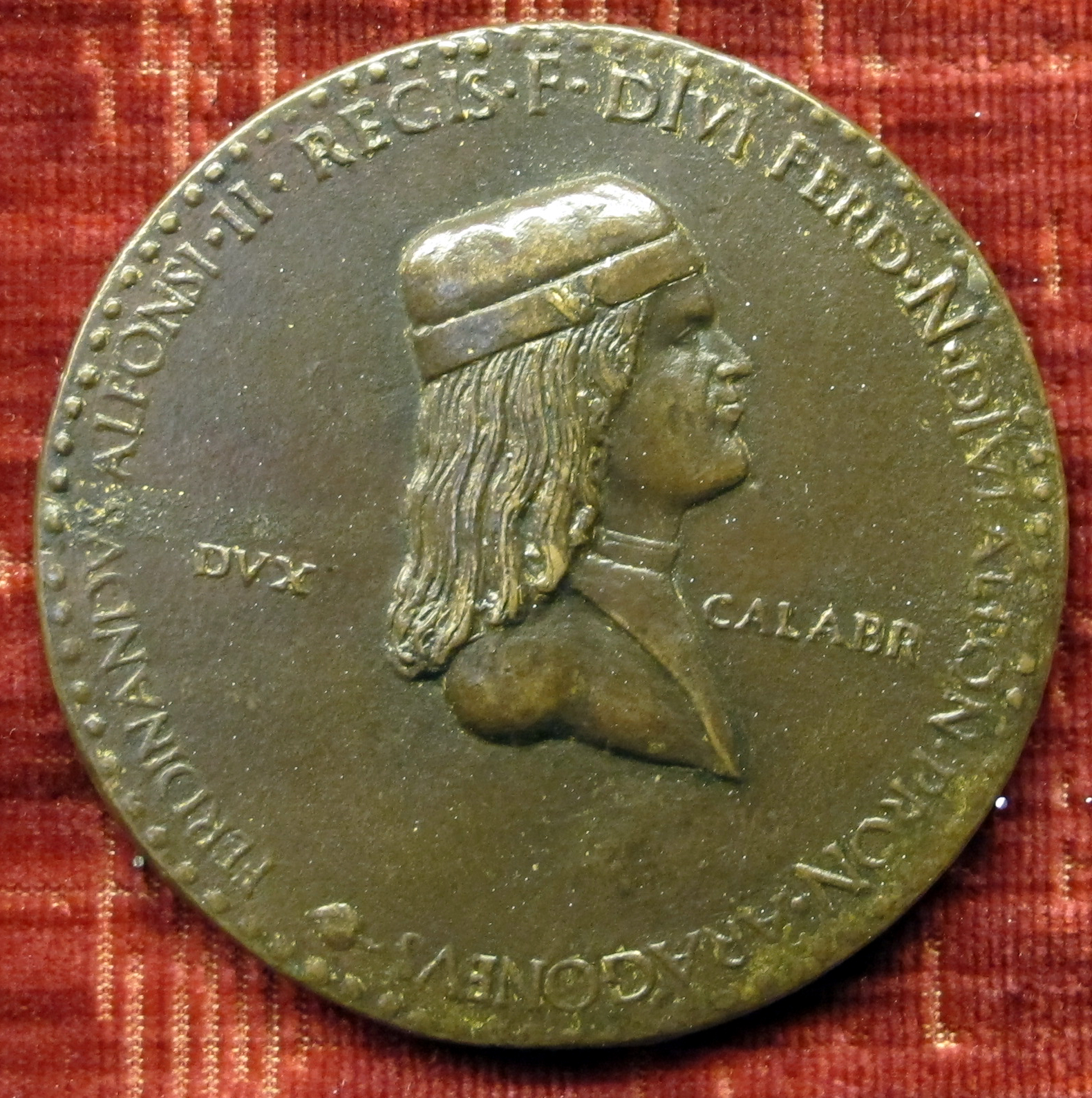 Medaglia di Ferdinando d'Aragona principe di Capua